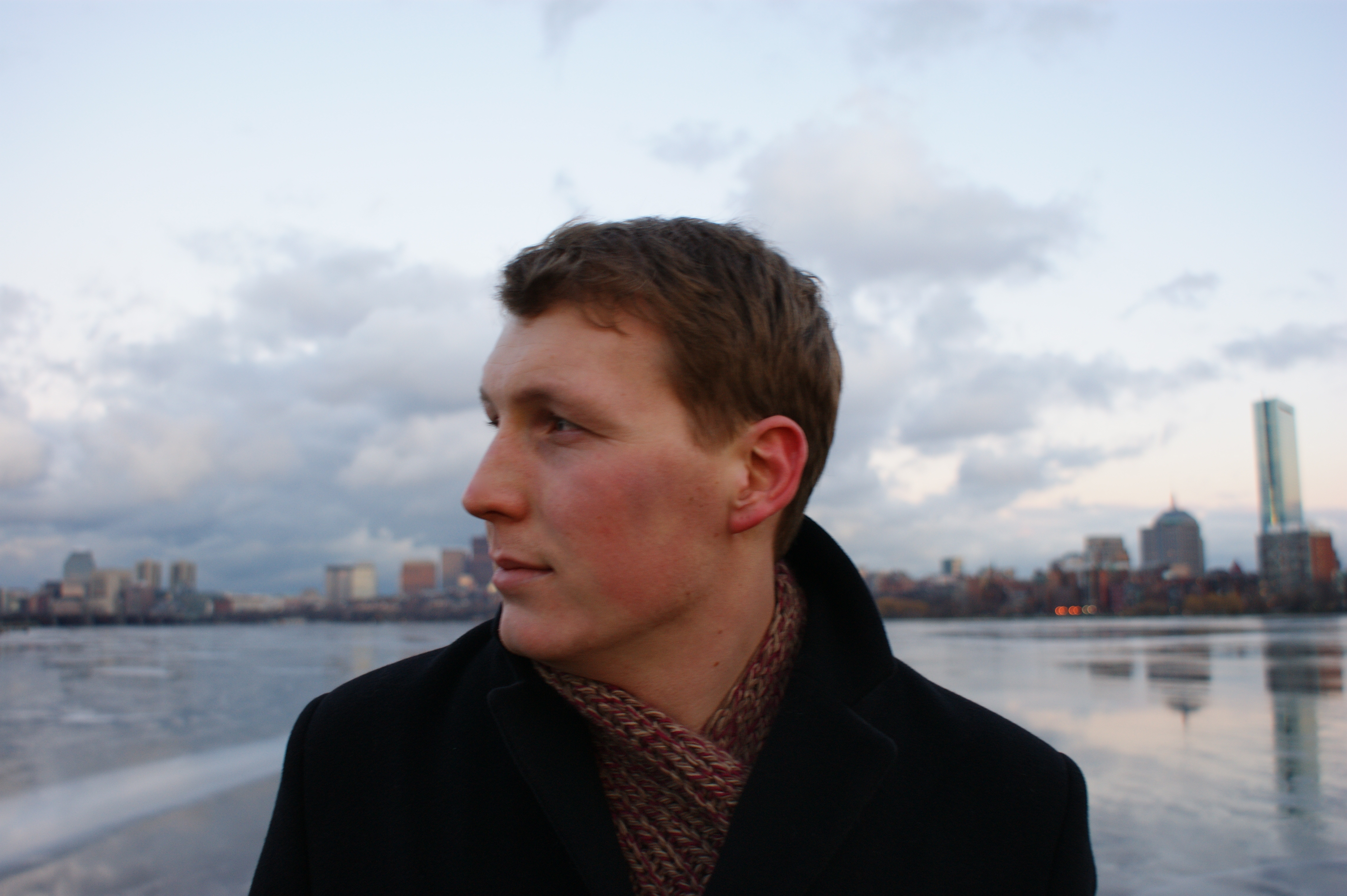 Роберт Шлегель